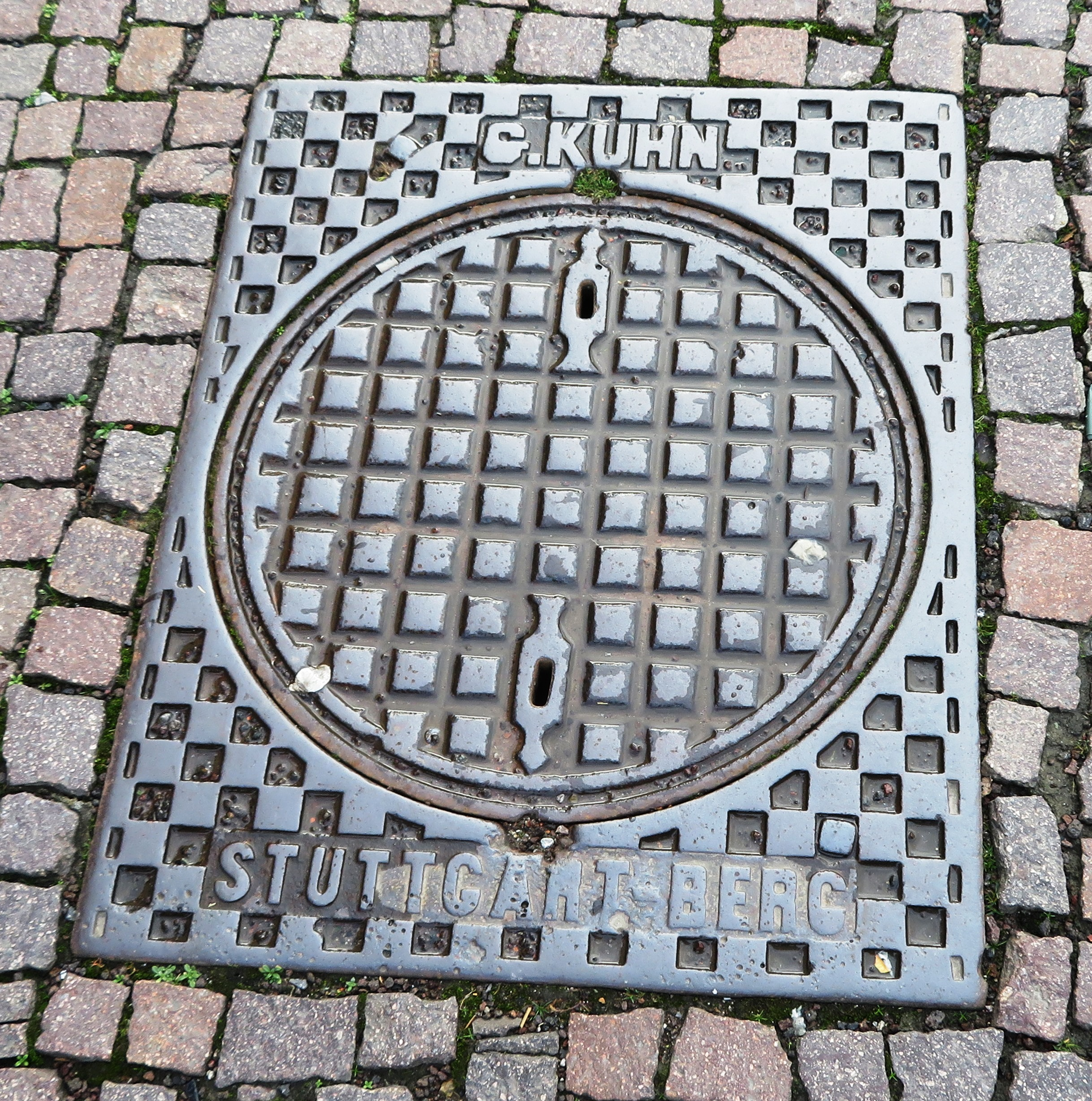 Schachtdeckel auf dem Stuttgarter Schlossplatz